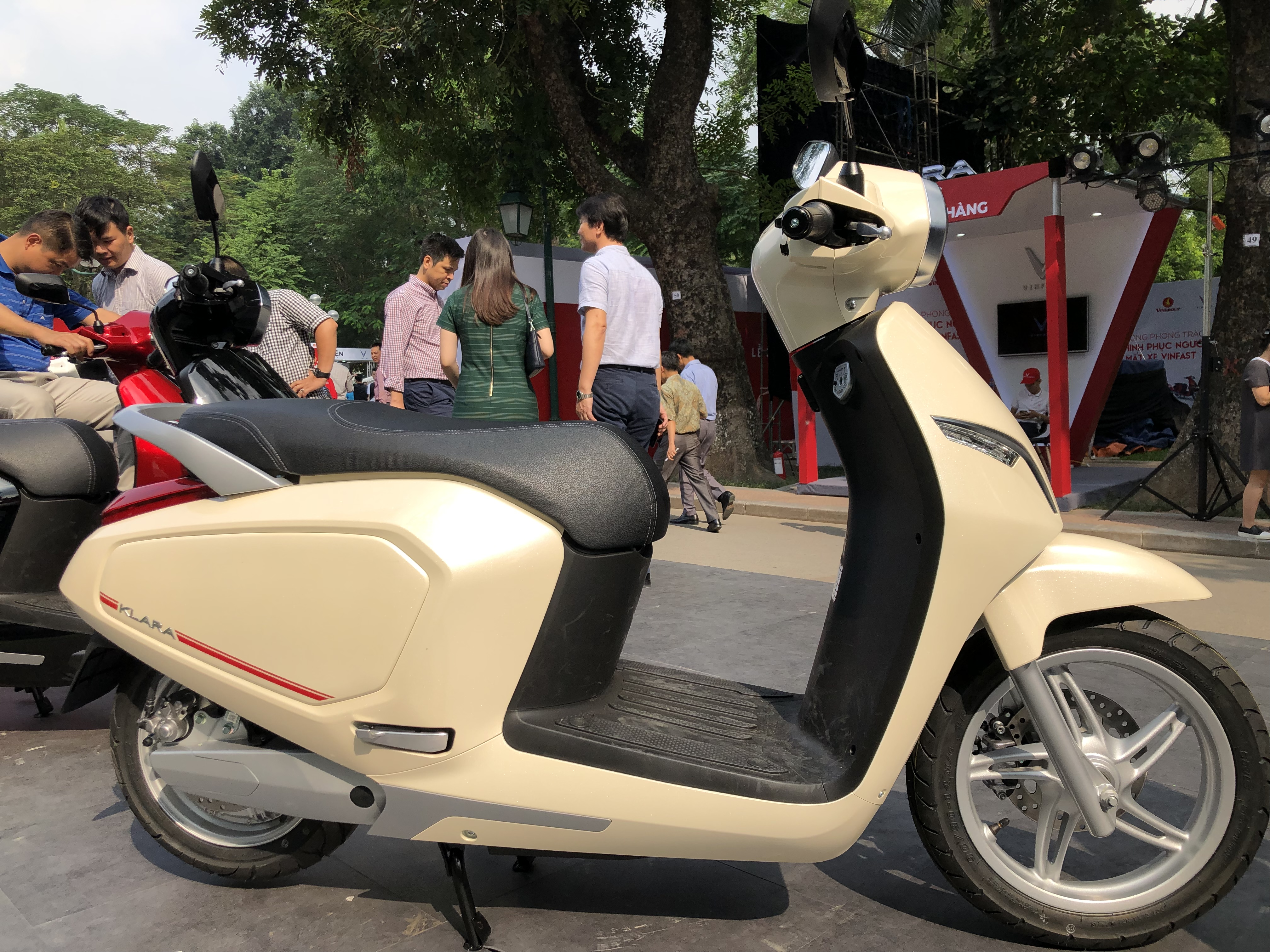 Xe máy điện VinFast Klara pin li-ion ngày mở bán